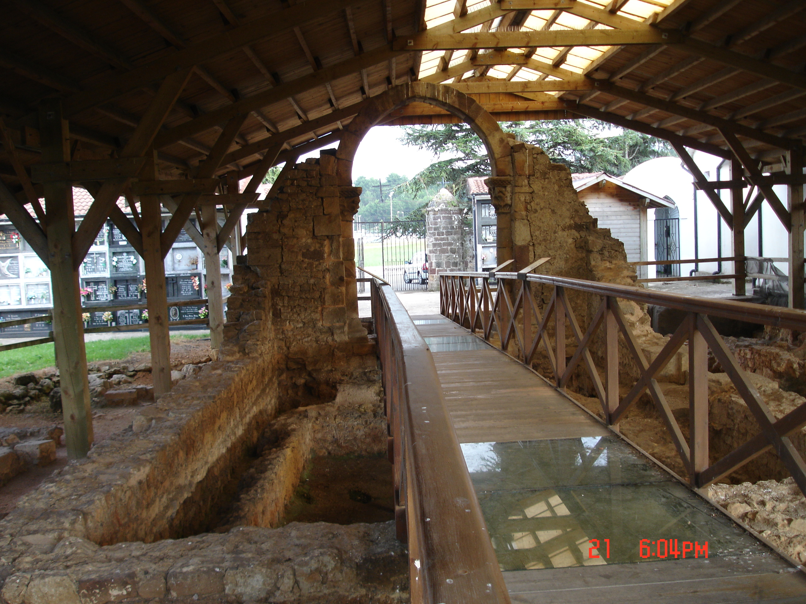 Zona en la que las tumbas están protegidas de la intemperie.